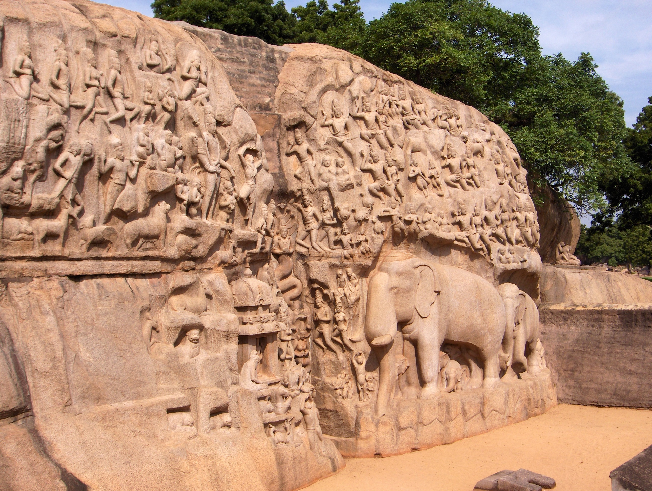 Foto van een beeldhouwwerk in Mahabalipuram.